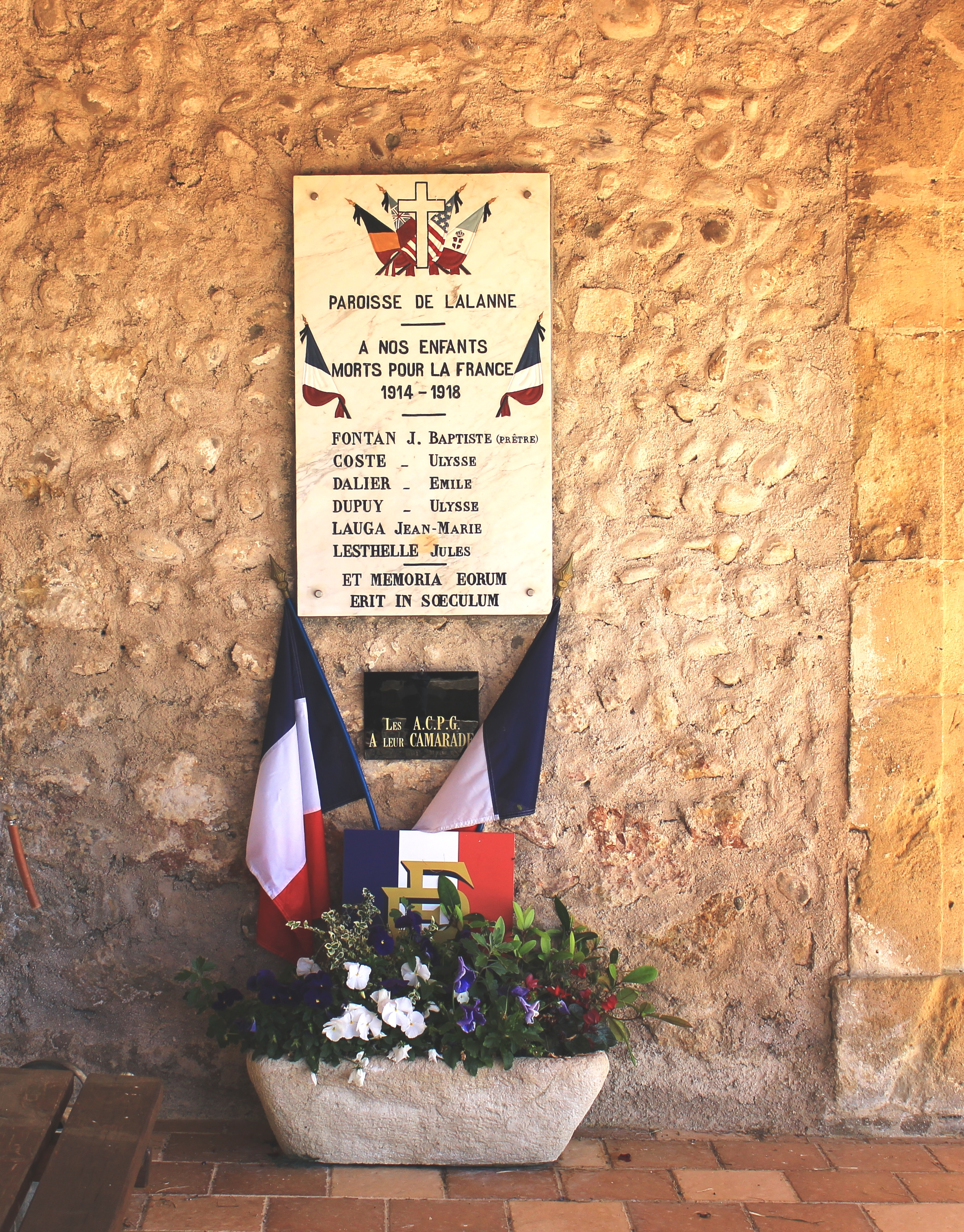 Monument aux morts de Lalanne-Trie (Hautes-Pyrénées)